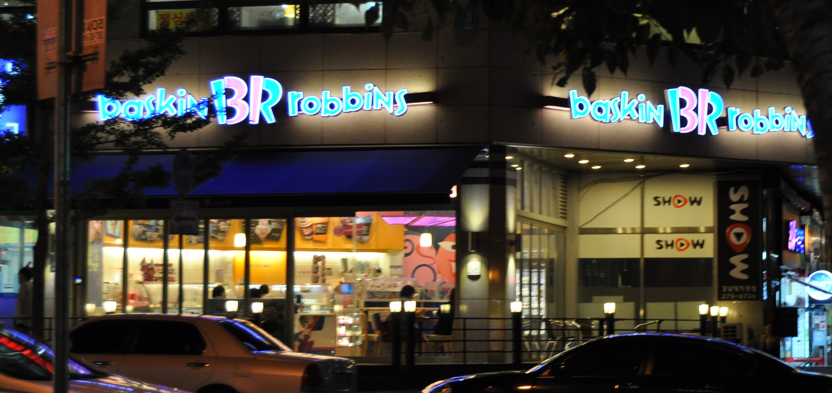 배스킨 라빈스 매장. 용인시 강남대 앞°